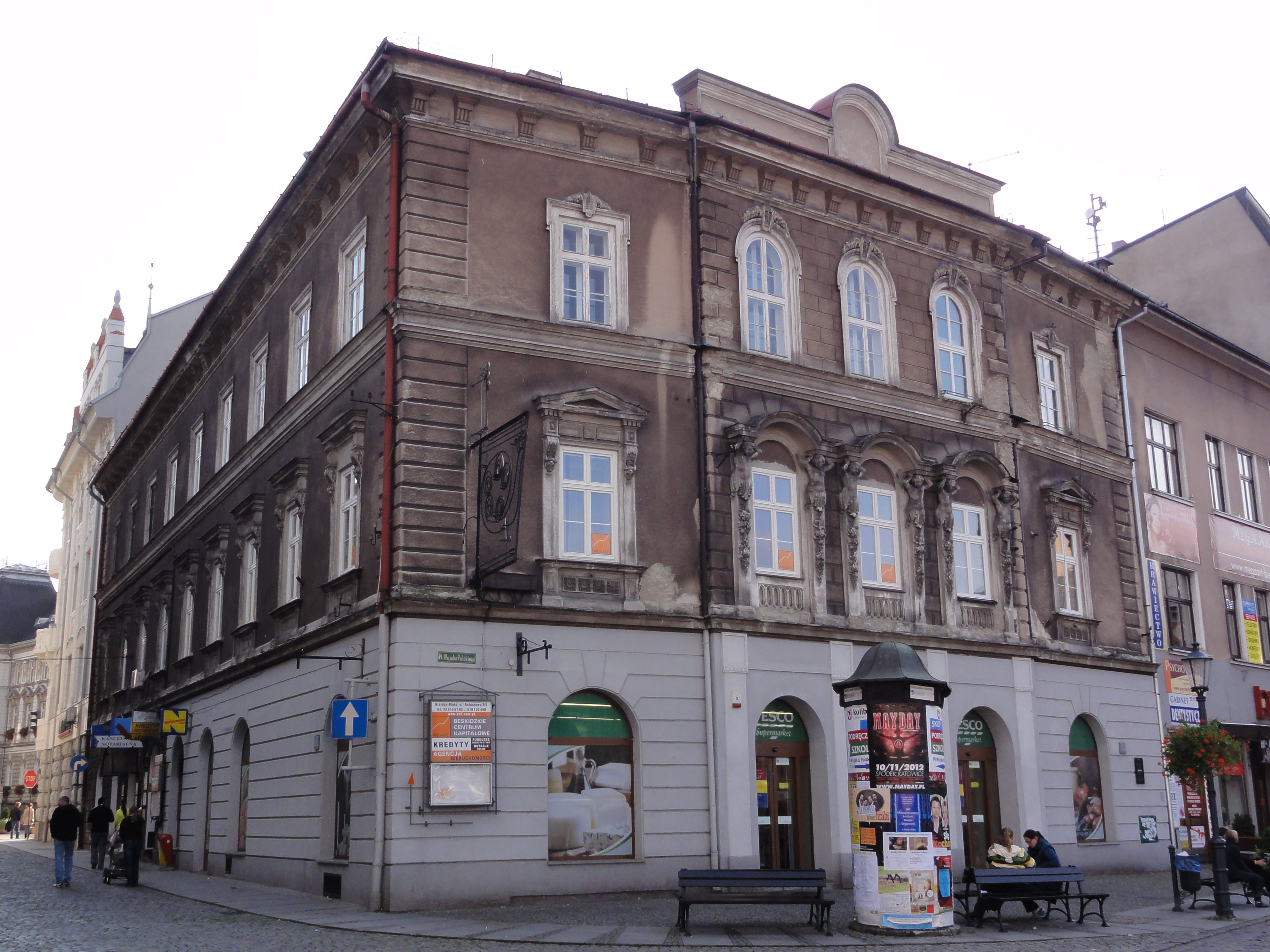 Bielsko-Biała, Plac Wojska Polskiego, stary ratusz w Białej